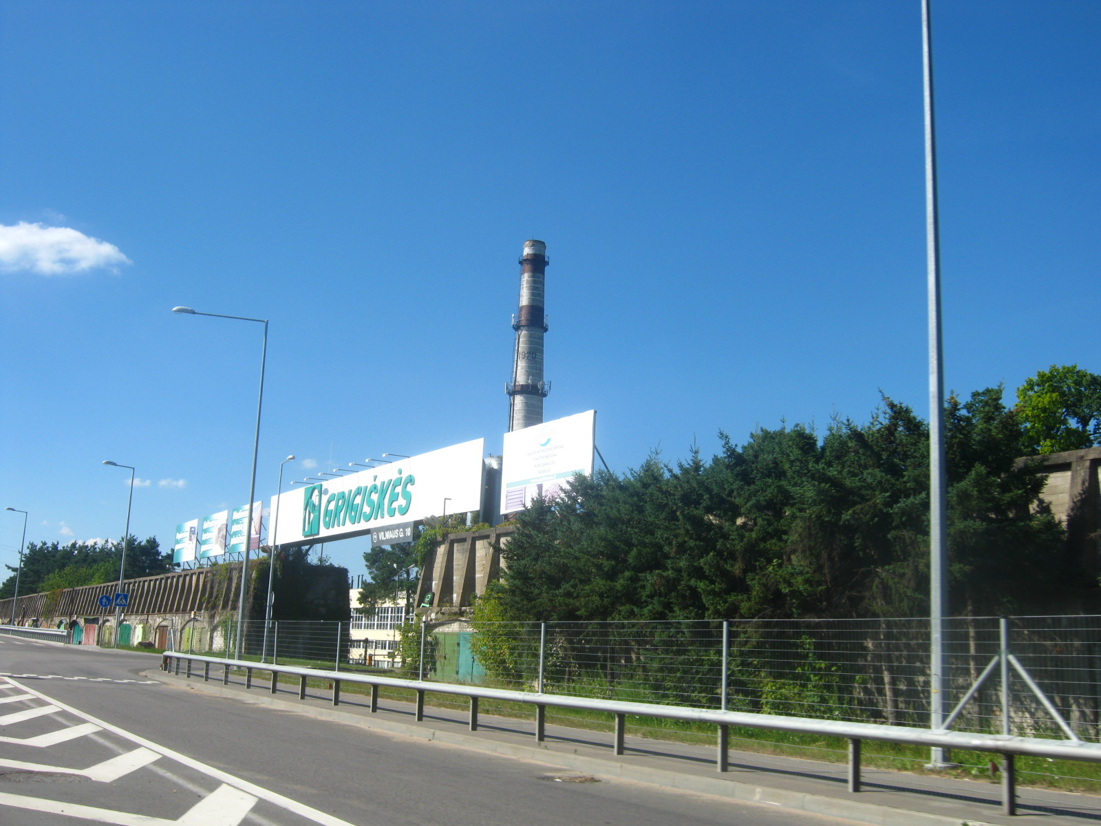 Grigiškės